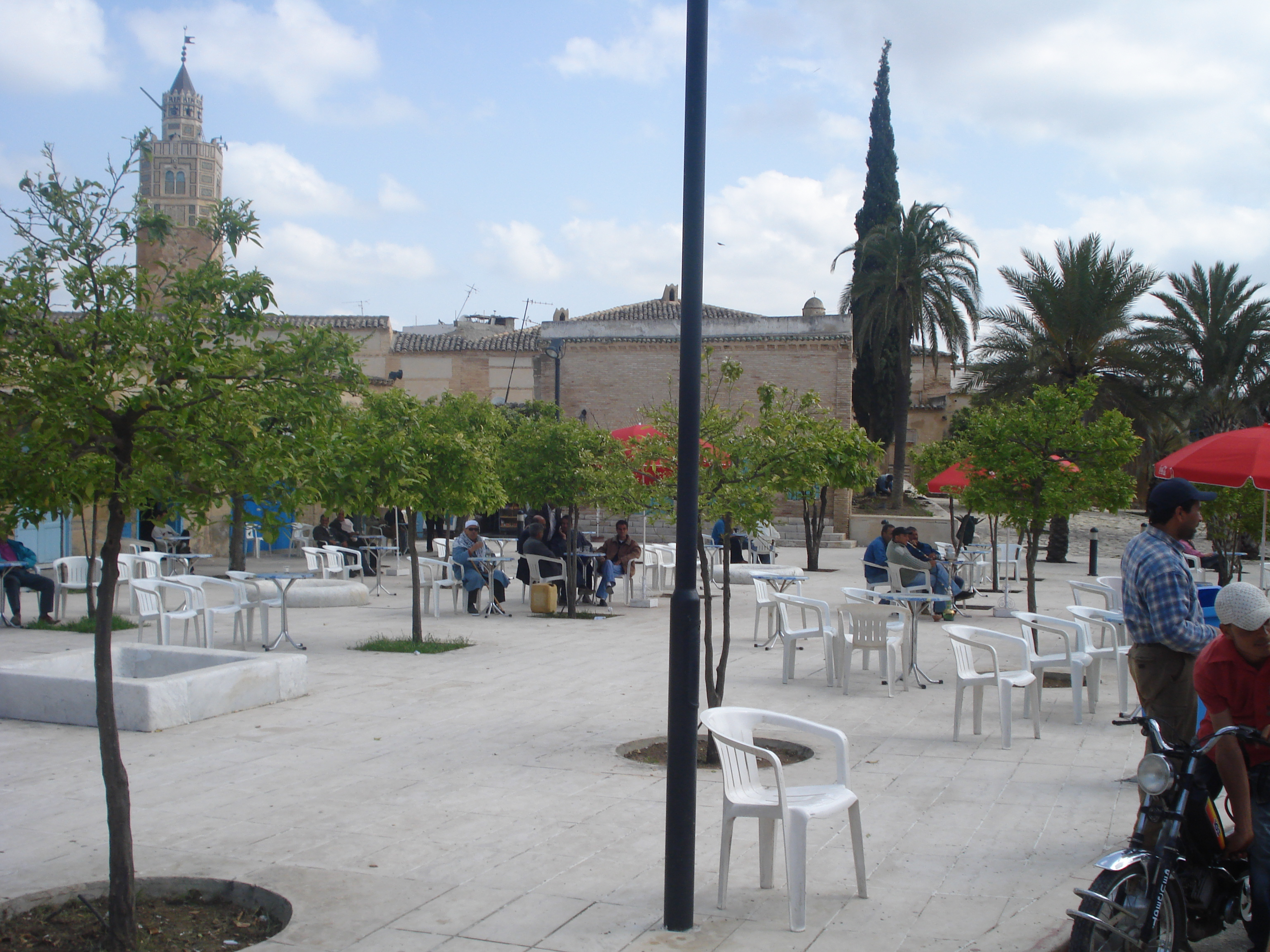 Place en face de la Grande mosquée de Testour (Tunisie)